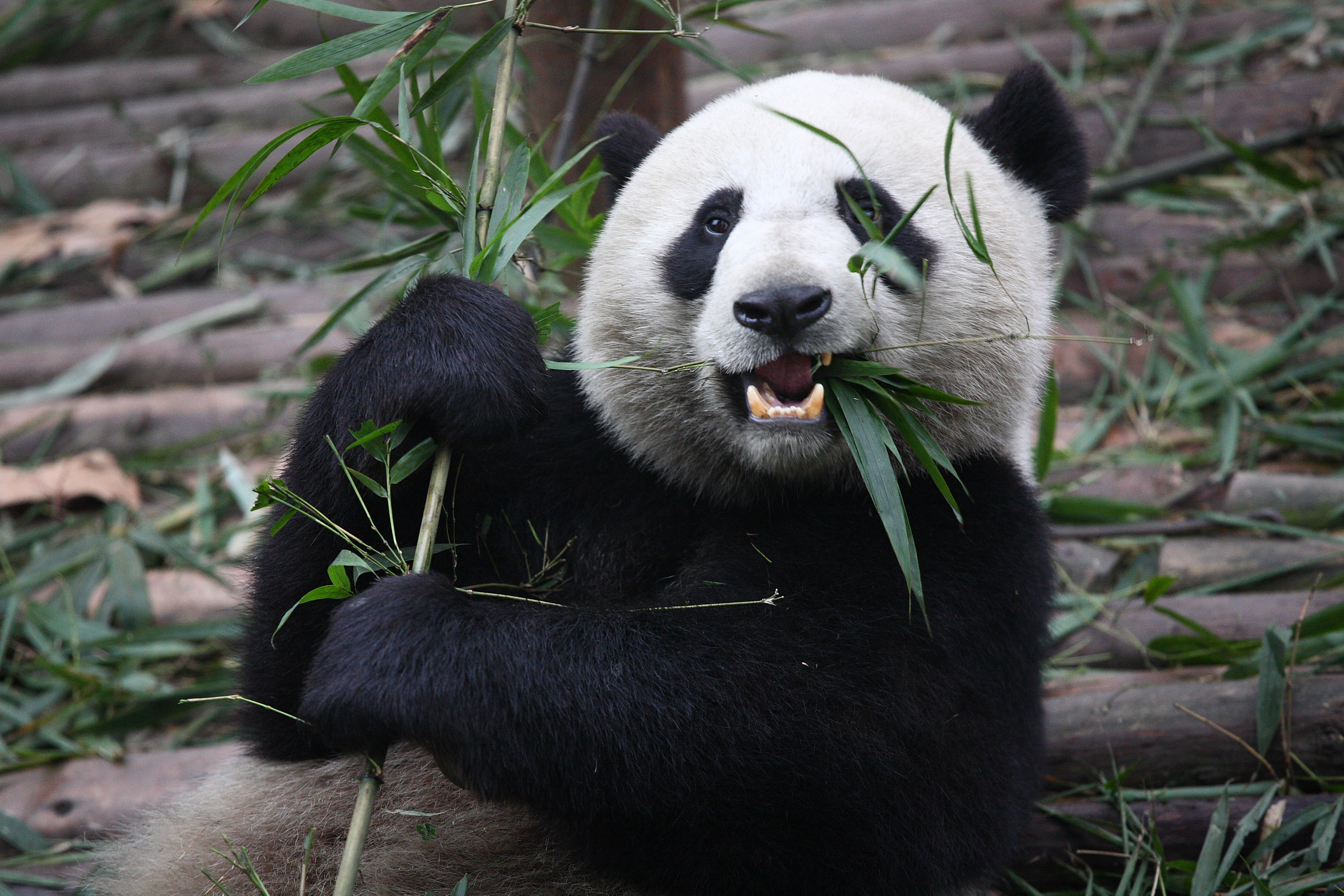 A giant panda eating bamboo